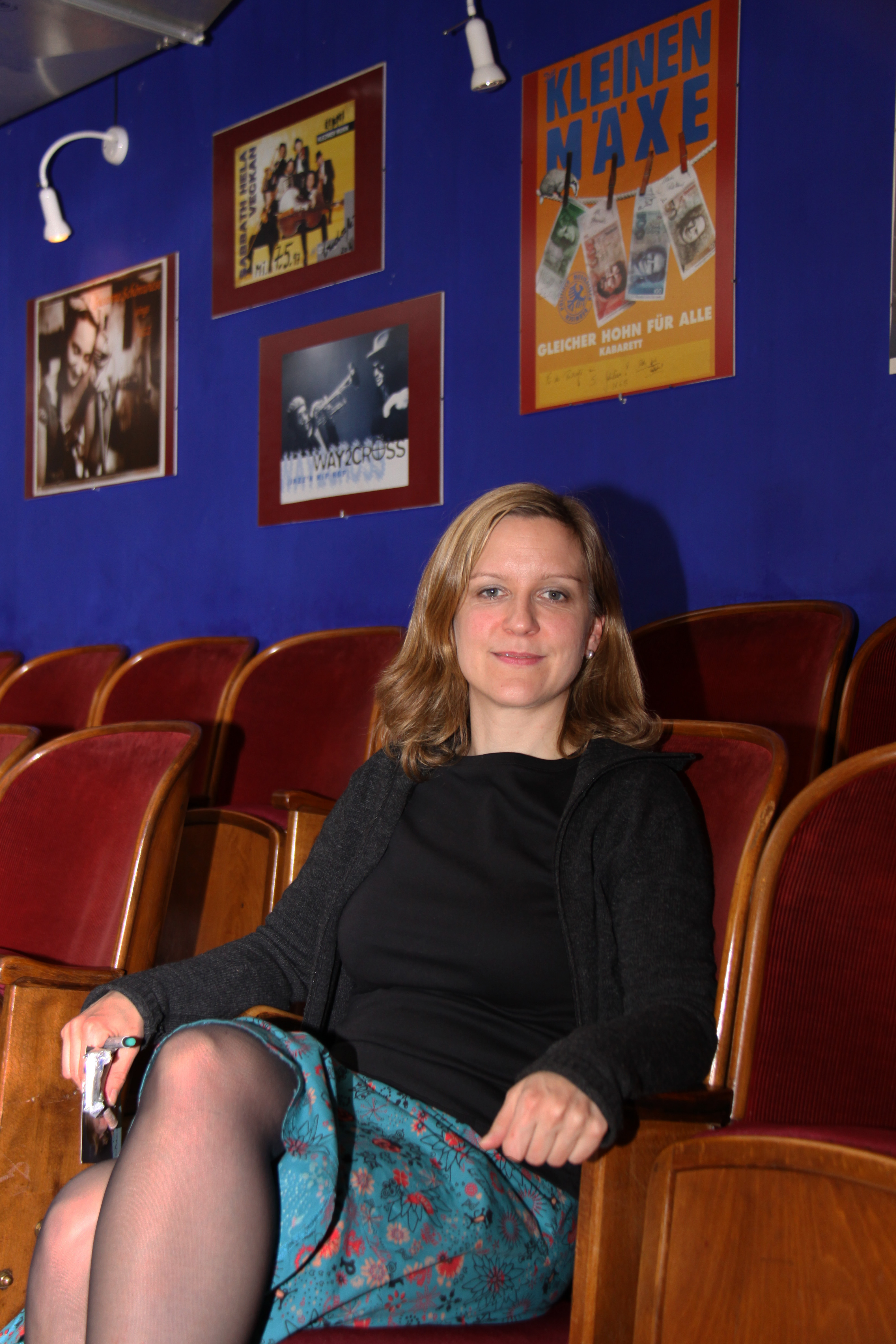 Käthe Lachmann nach Auftritt im buchcafe in Bad Hersfeld